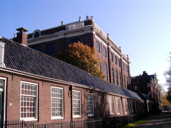 Eigen werk.